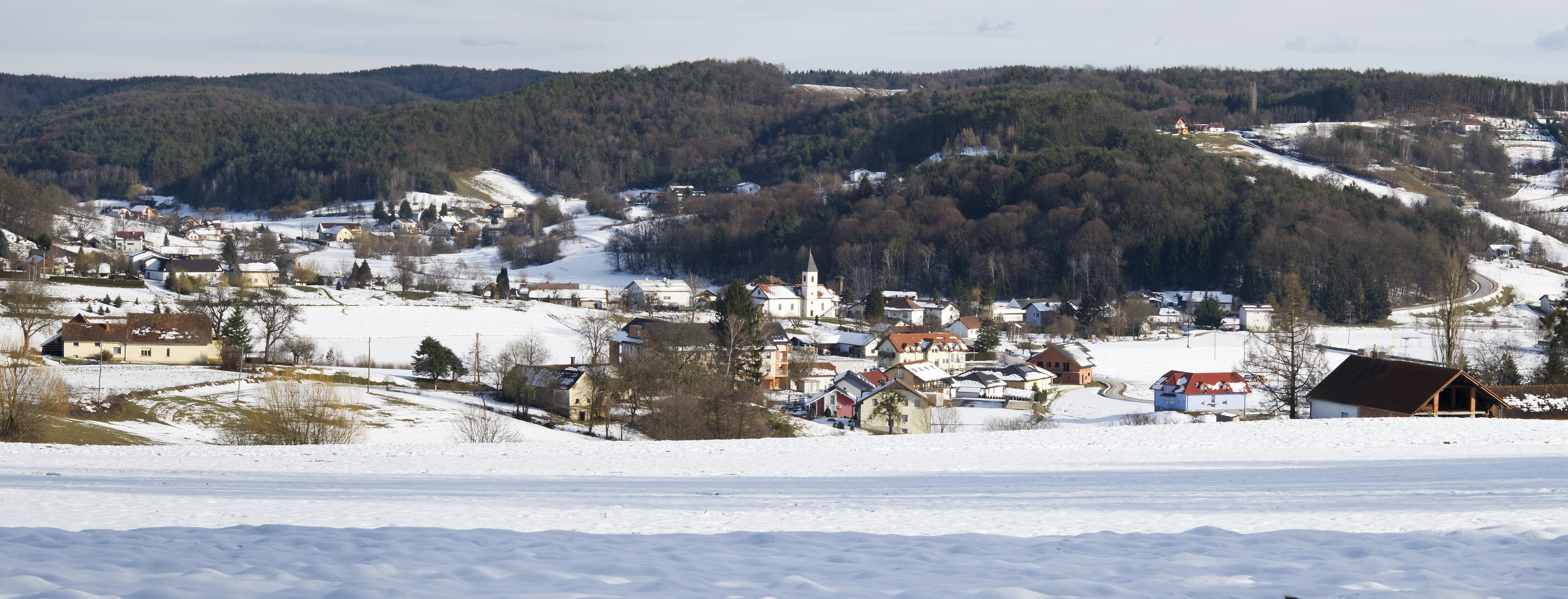 Kuzma-Panorama